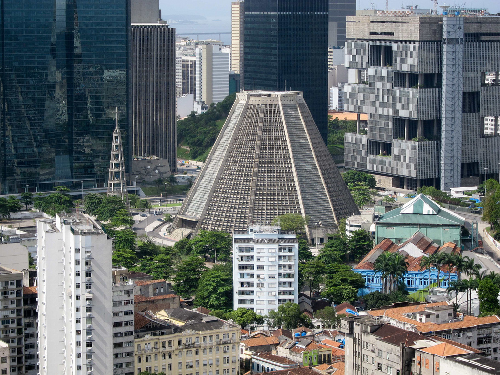 Catedral Metropolitana do Rio de Janeiro, Brasil.